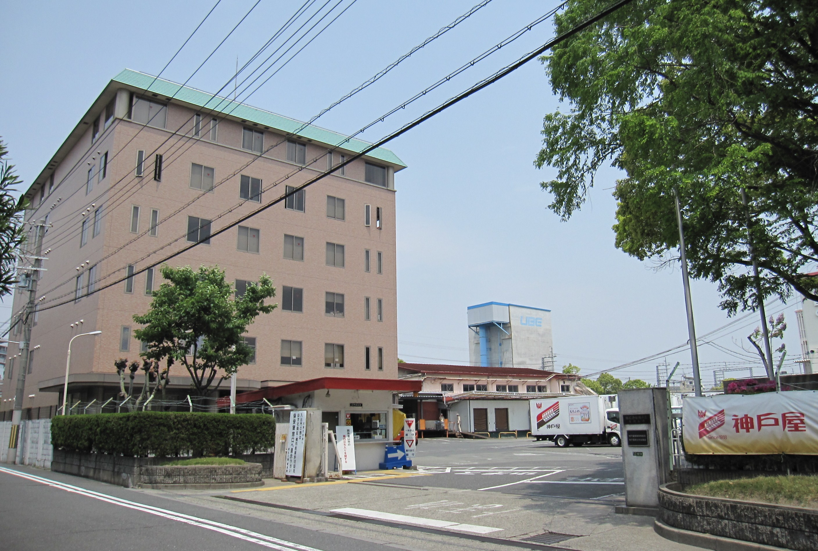 神戸屋本社